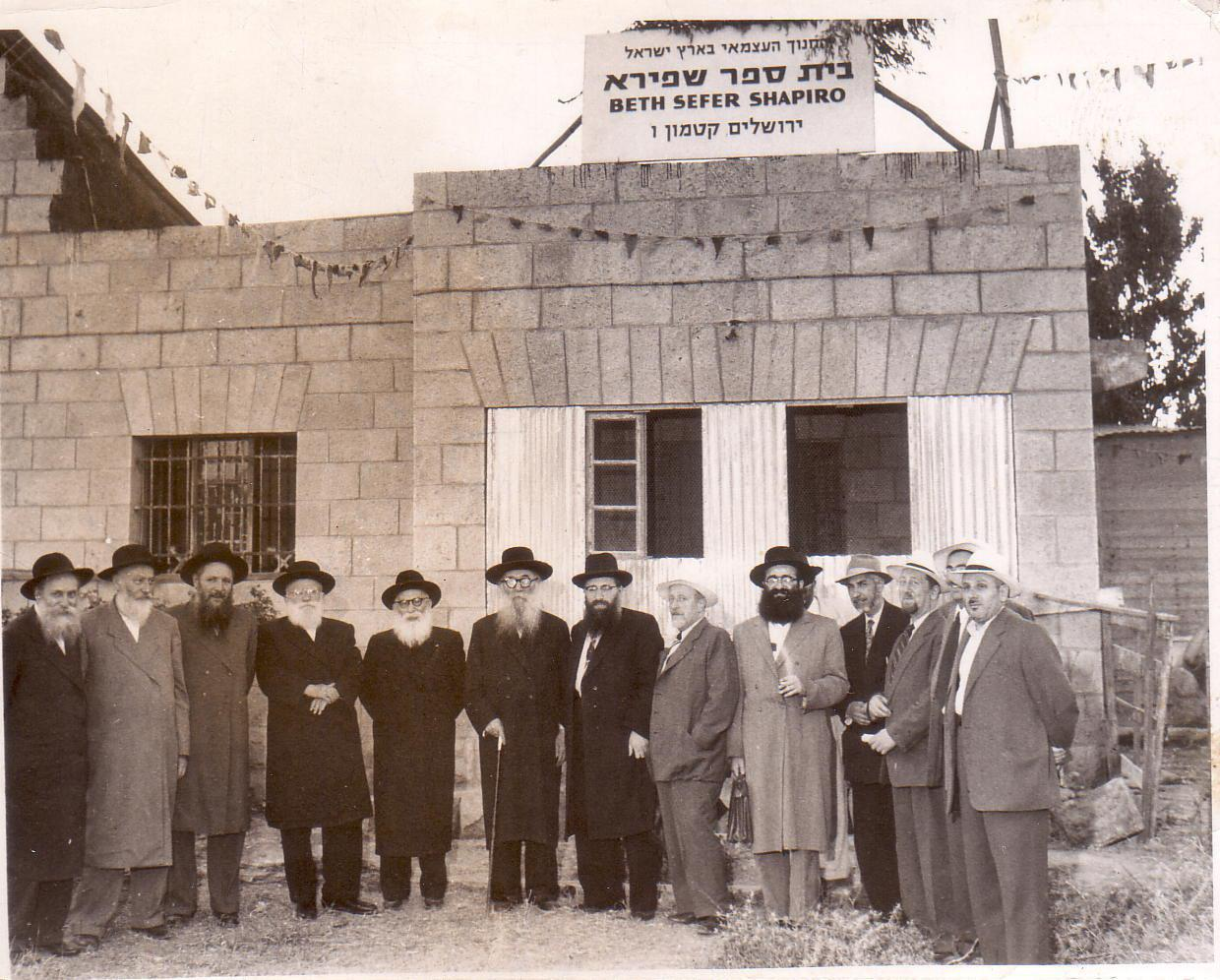 חנוכת בית ספר של החינוך העצמאי במרכז התמונה מנחם פרוש הרב זלמן סורוצקין הרב אליעזר יהודה פינקל ומשה פרוש